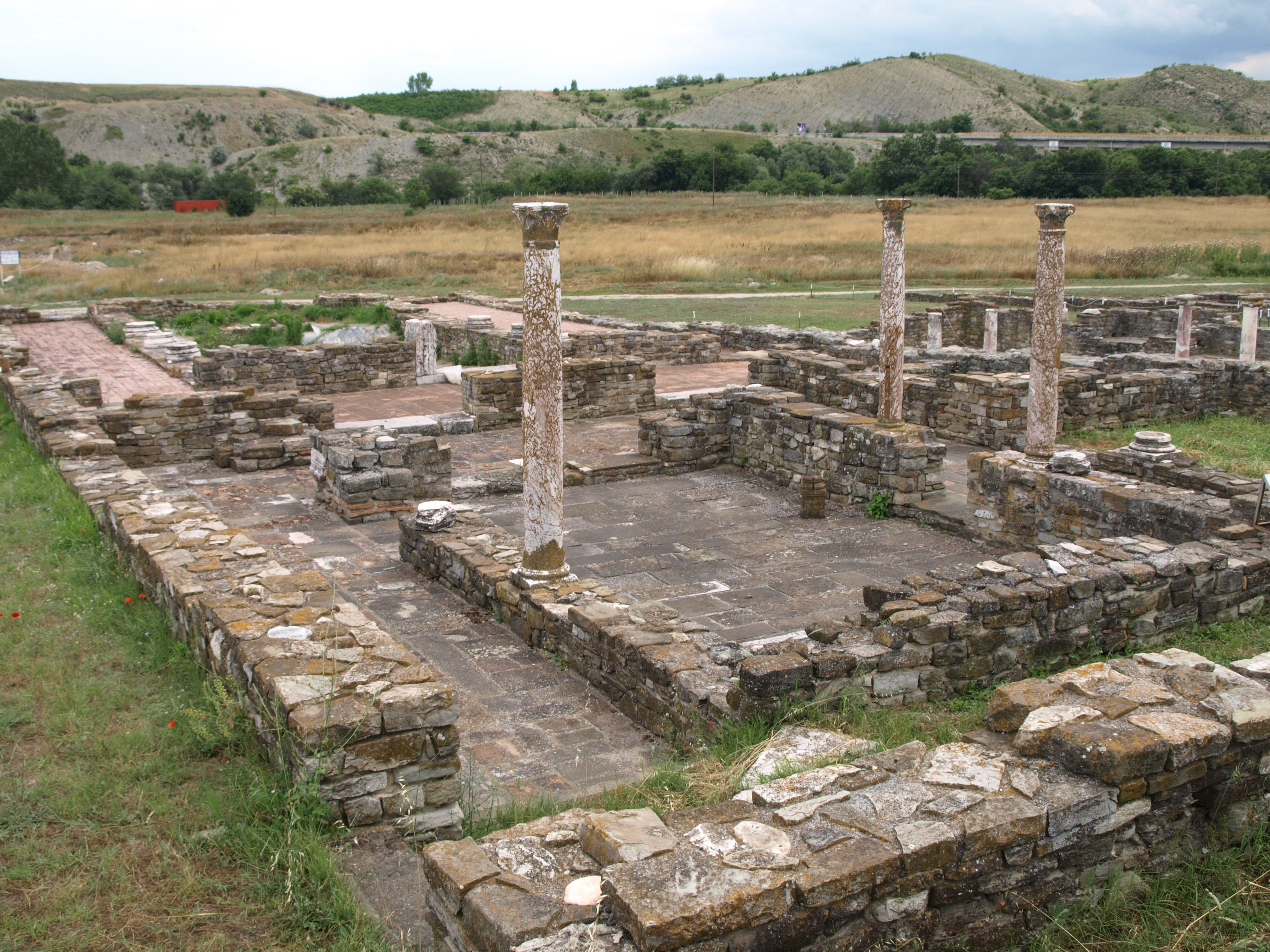 Gelände der Ausgrabungen in Stobi